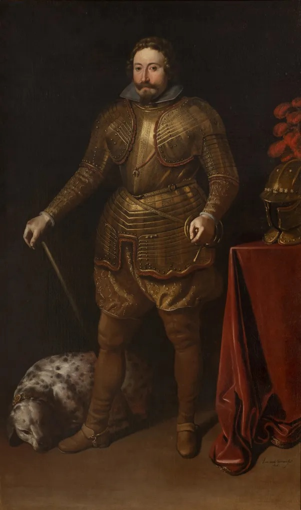 Retrato de Jean de Croÿ, conde de Solre (1588-1638)